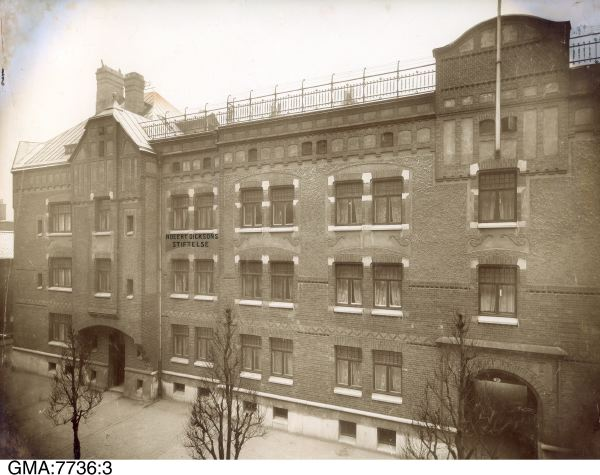 Kvarteret Löjtnanten. Vy med Robert Dicksons Stiftelse, Kaponjärgatan 3. Huset byggt 1904.